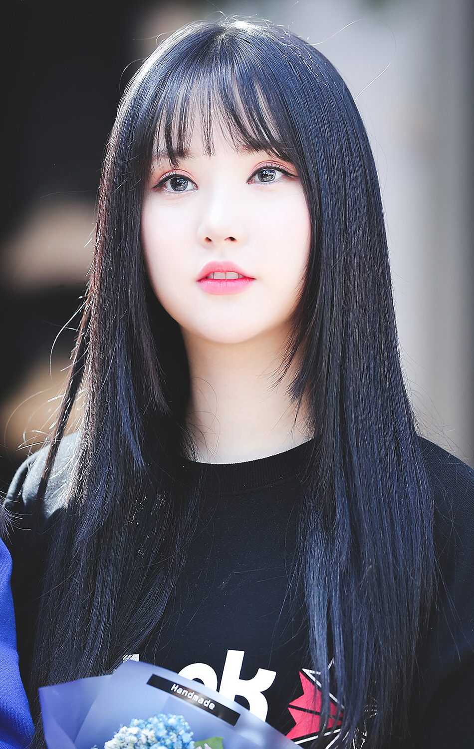 180428 리복 팬싸인회